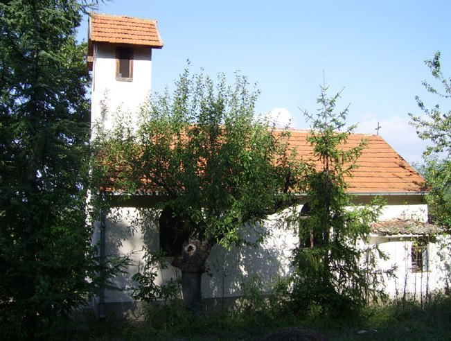 L'église orthodoxe serbe Saint-Georges.